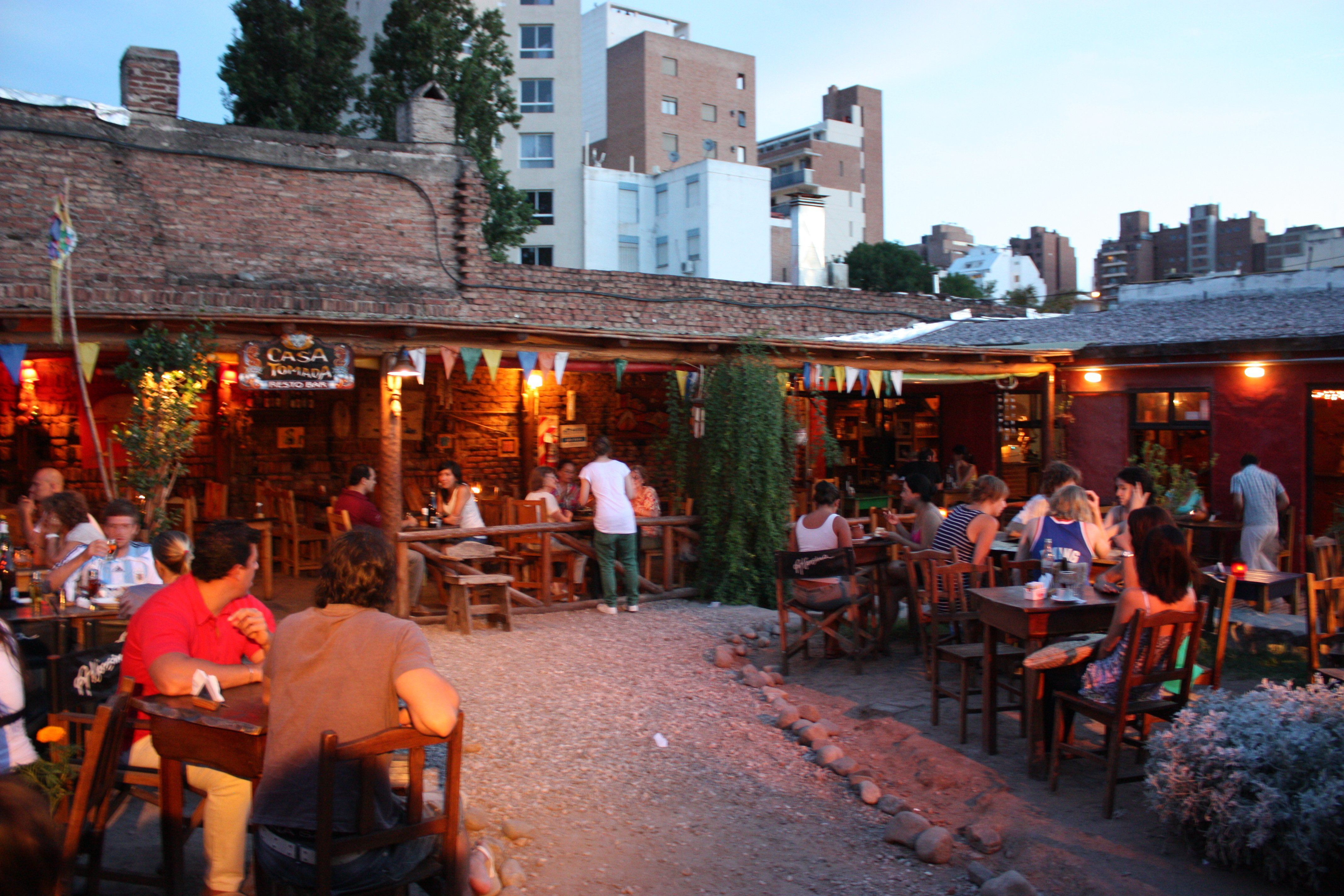 Ao final do corredor da foto ao lado, perto do Paseo de las Artes.